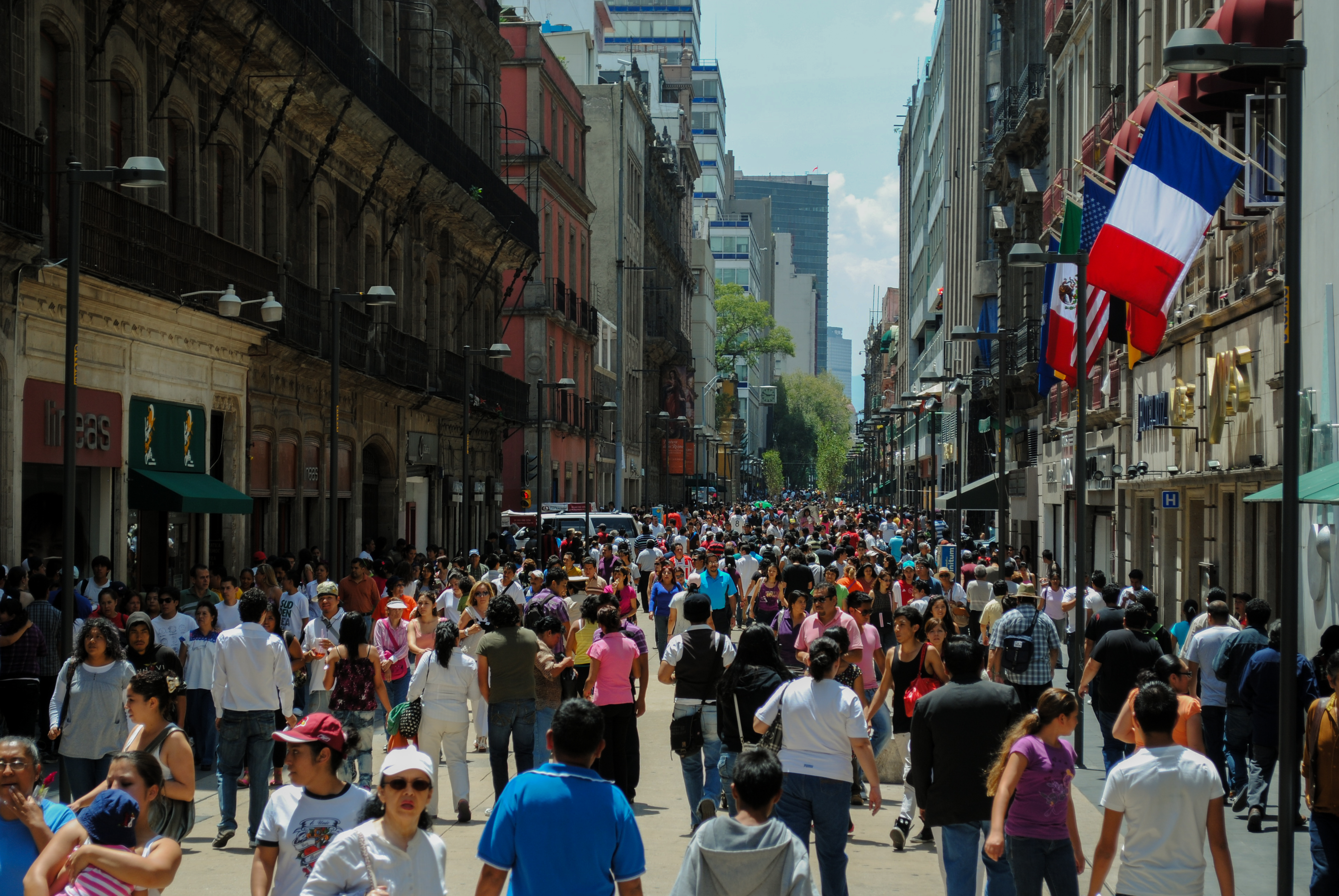 Calle Madero, Centro Histórico de la Ciudad de México